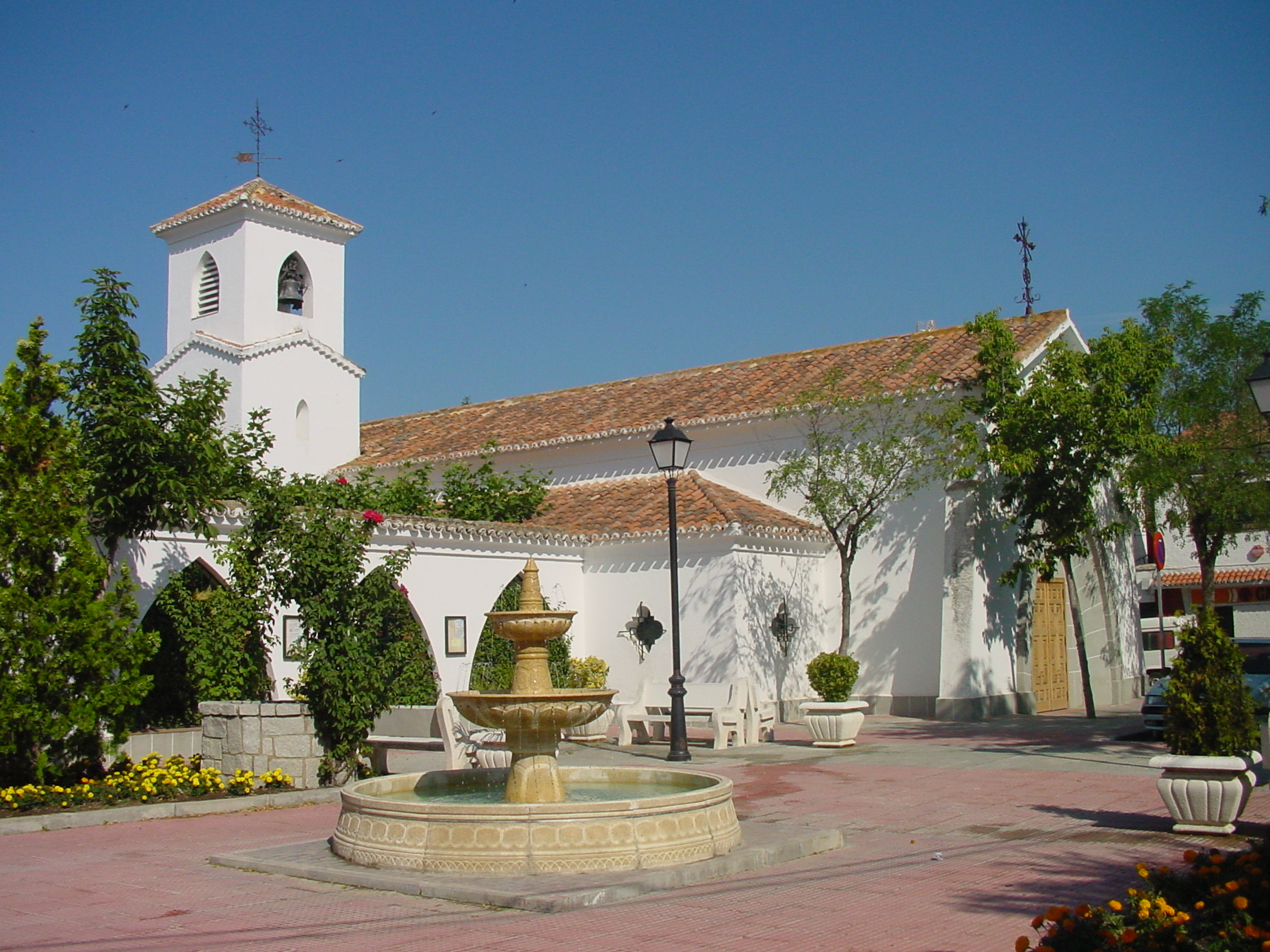 Fuente e iglesia en Villanueva del Pardillo.